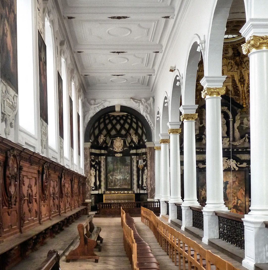 Gallerij